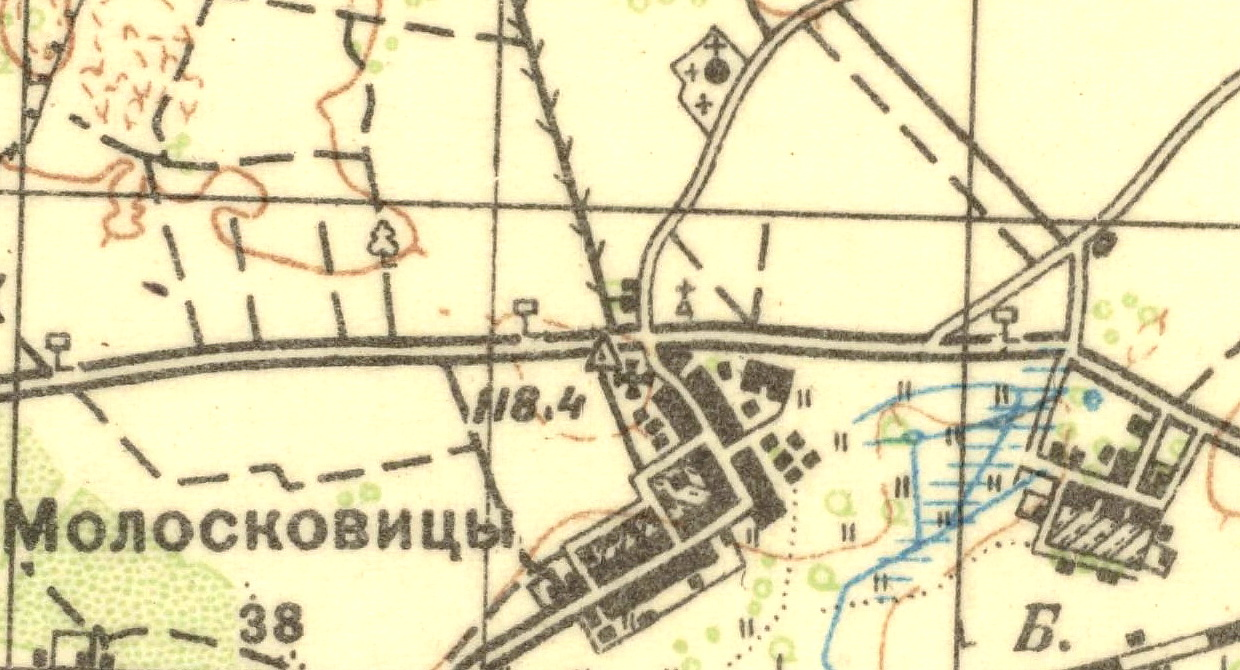 Топографическая карта Ленинградской области, квадрат О-35-23-В (Хотыницы), деревня Молосковицы